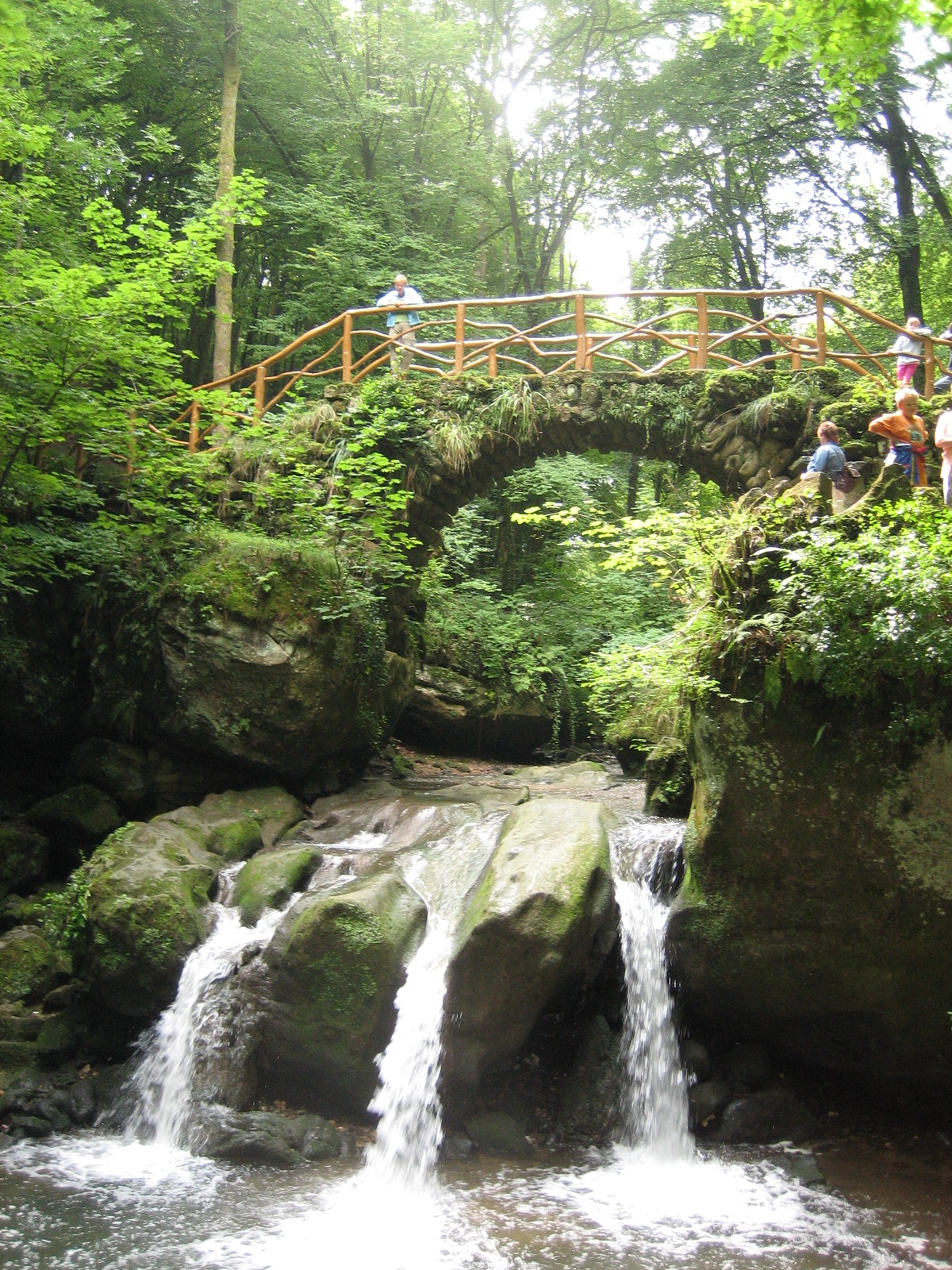 D'Schwaarz Ernz um Schéissendëmpel an der Klenger Lëtzebuerger Schwäiz